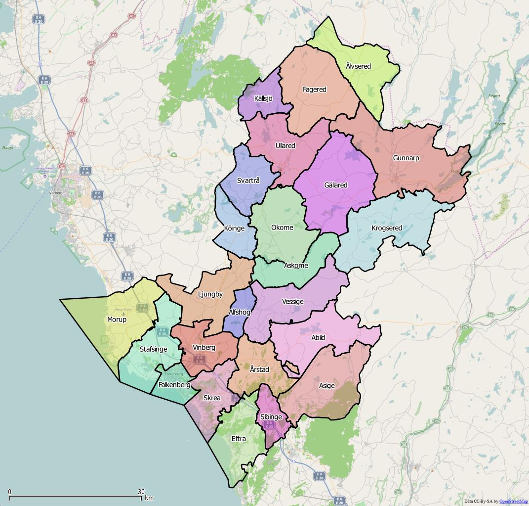 Distriktsindelningen i Falkenbergs kommun